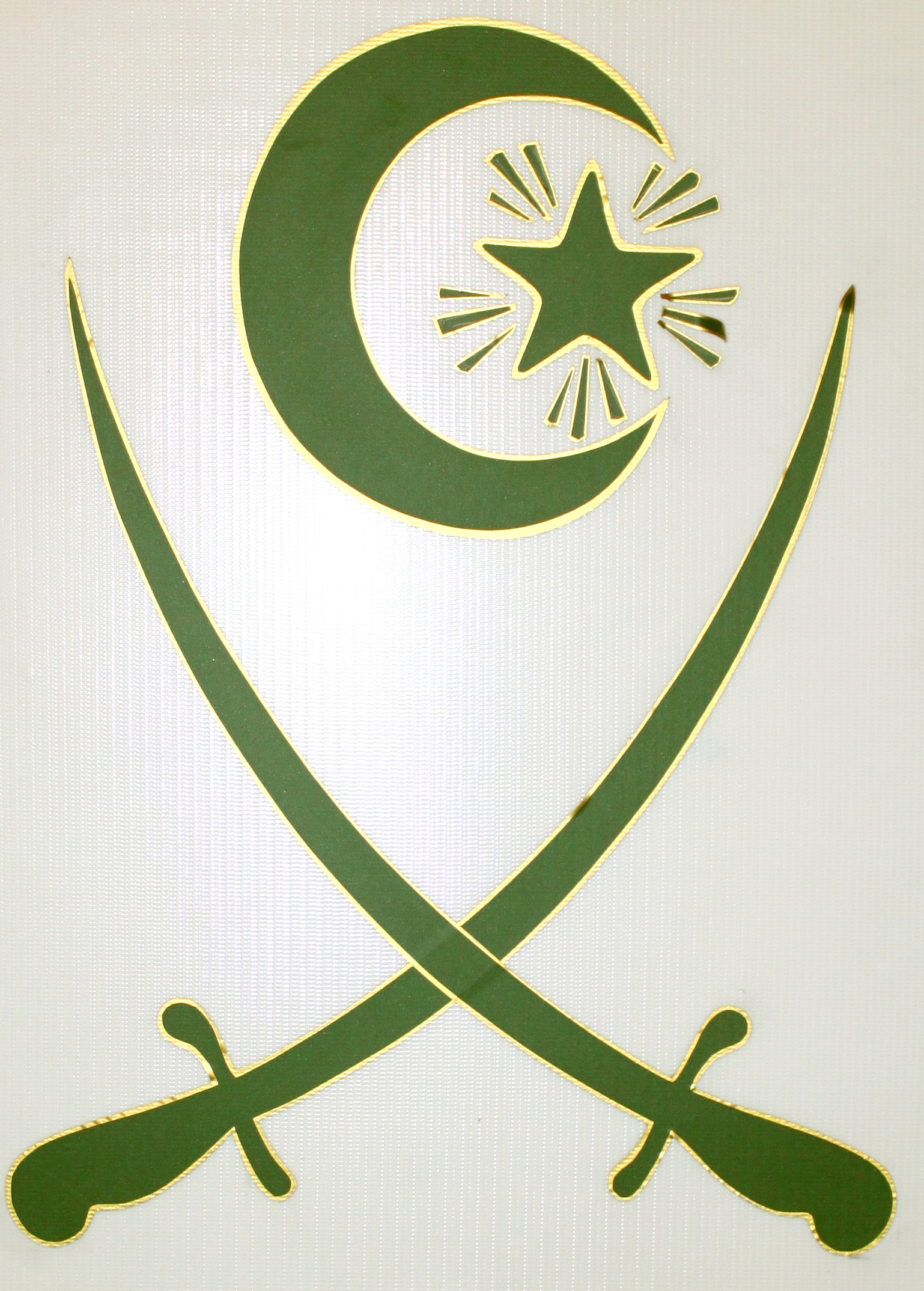 Difai təşkilatının emblemi